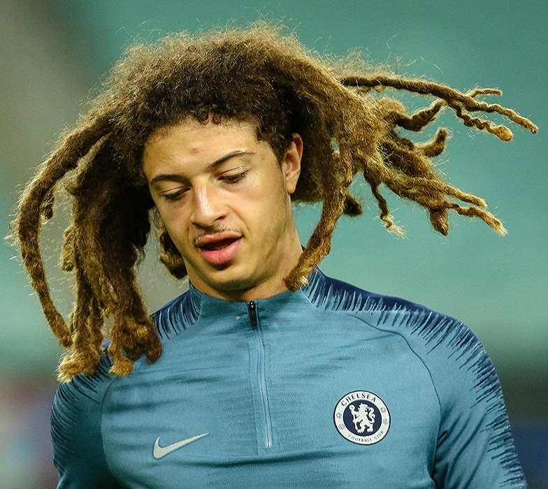 تمرین تیم فوتبال چلسی پیش از فینال لیگ قهرمانان اروپا ۲۰۱۹